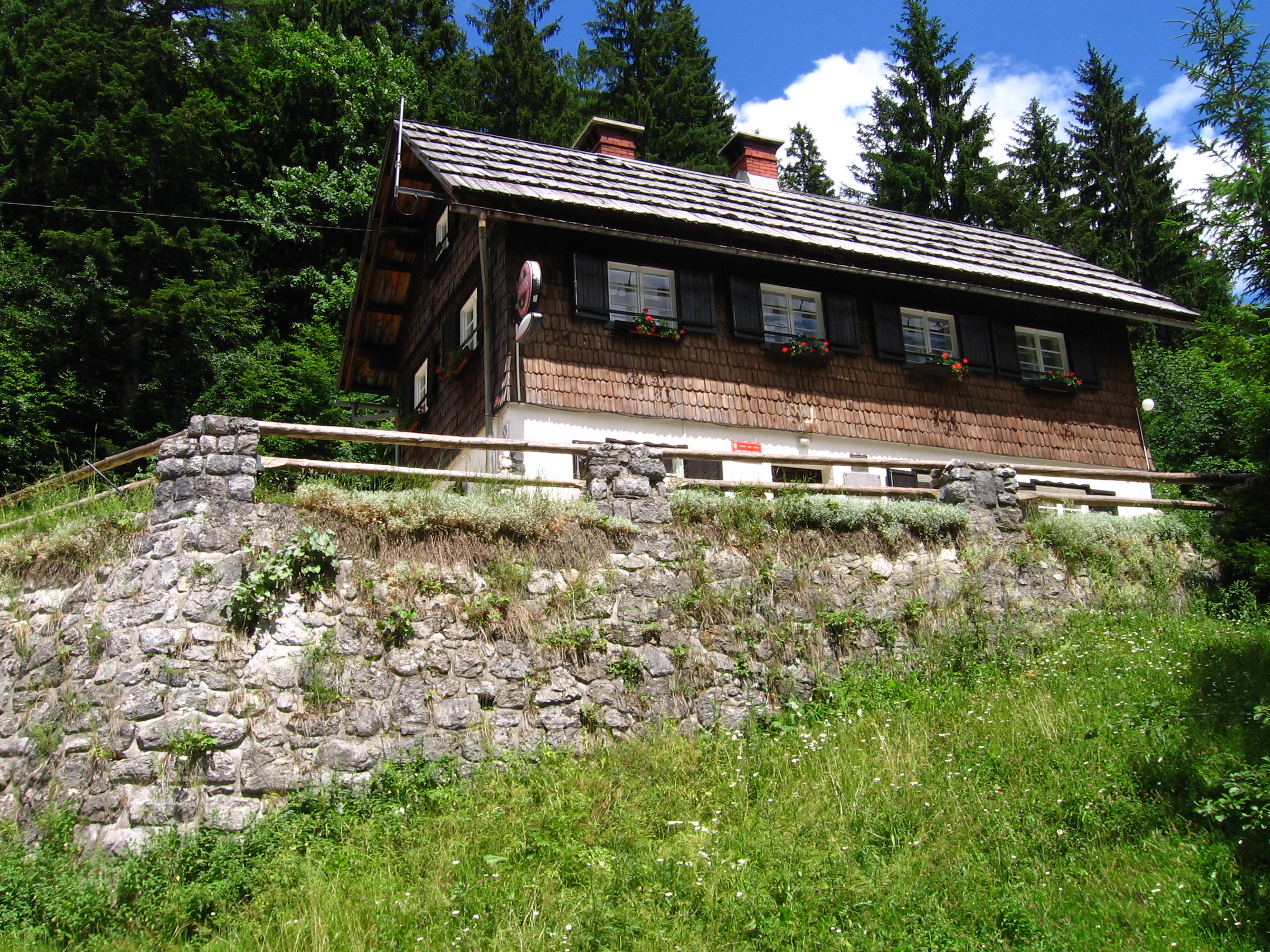 Hut of Miha Arih on Vršič (1150m)